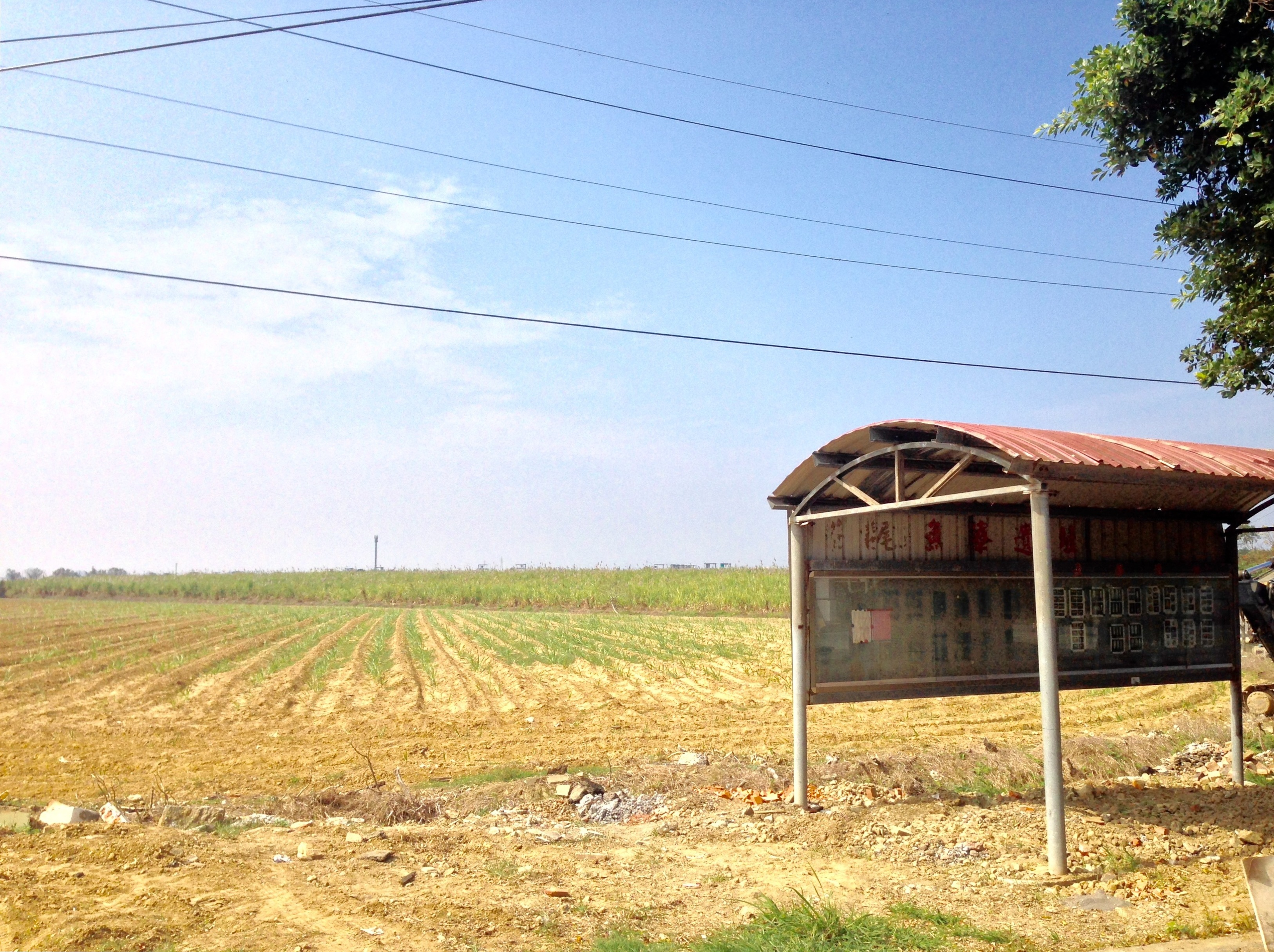 魚寮遺址所在地